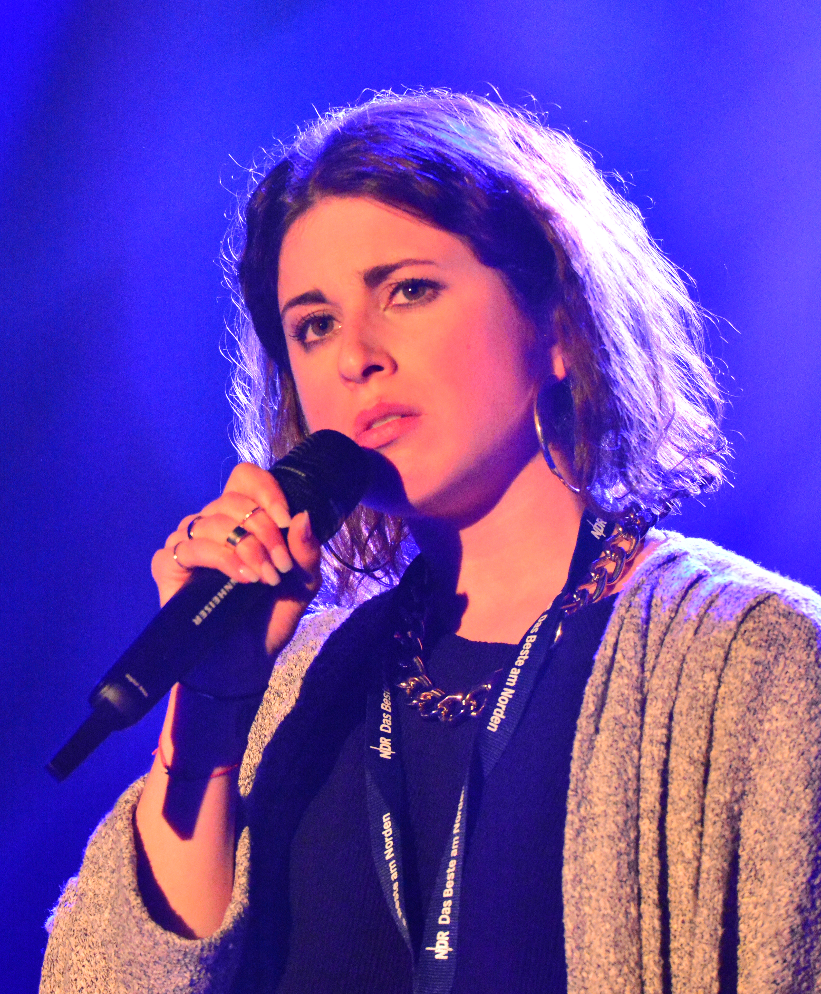 Ann Sophie bei den Proben zum Clubkonzert in der „Großen Freiheit 36“ in Hamburg